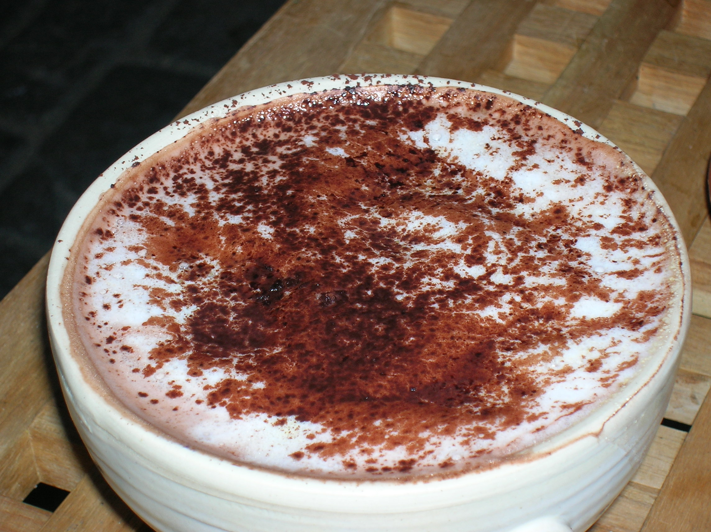 Chocolademelk